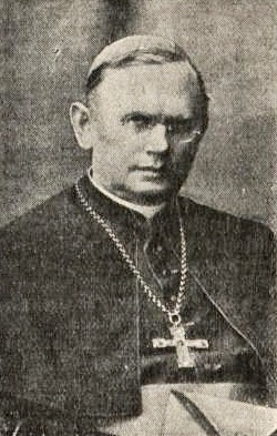 Biskup sufragan wrocławski Walenty Wojciech